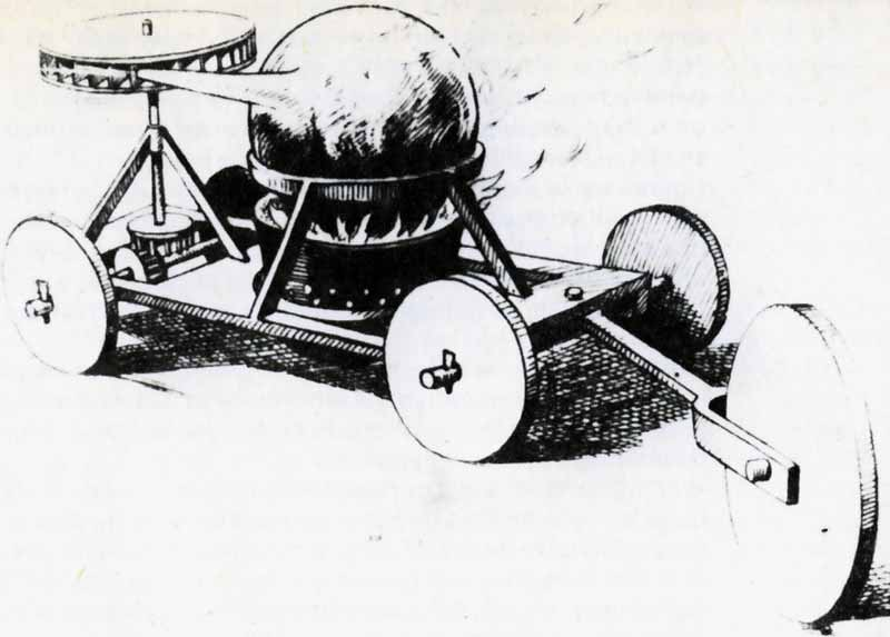 Steam Machine Of Verbiest, In 1678. (See Ferdinand Verbiest)